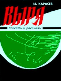 Обложка к книге И. Карасева "Выря"